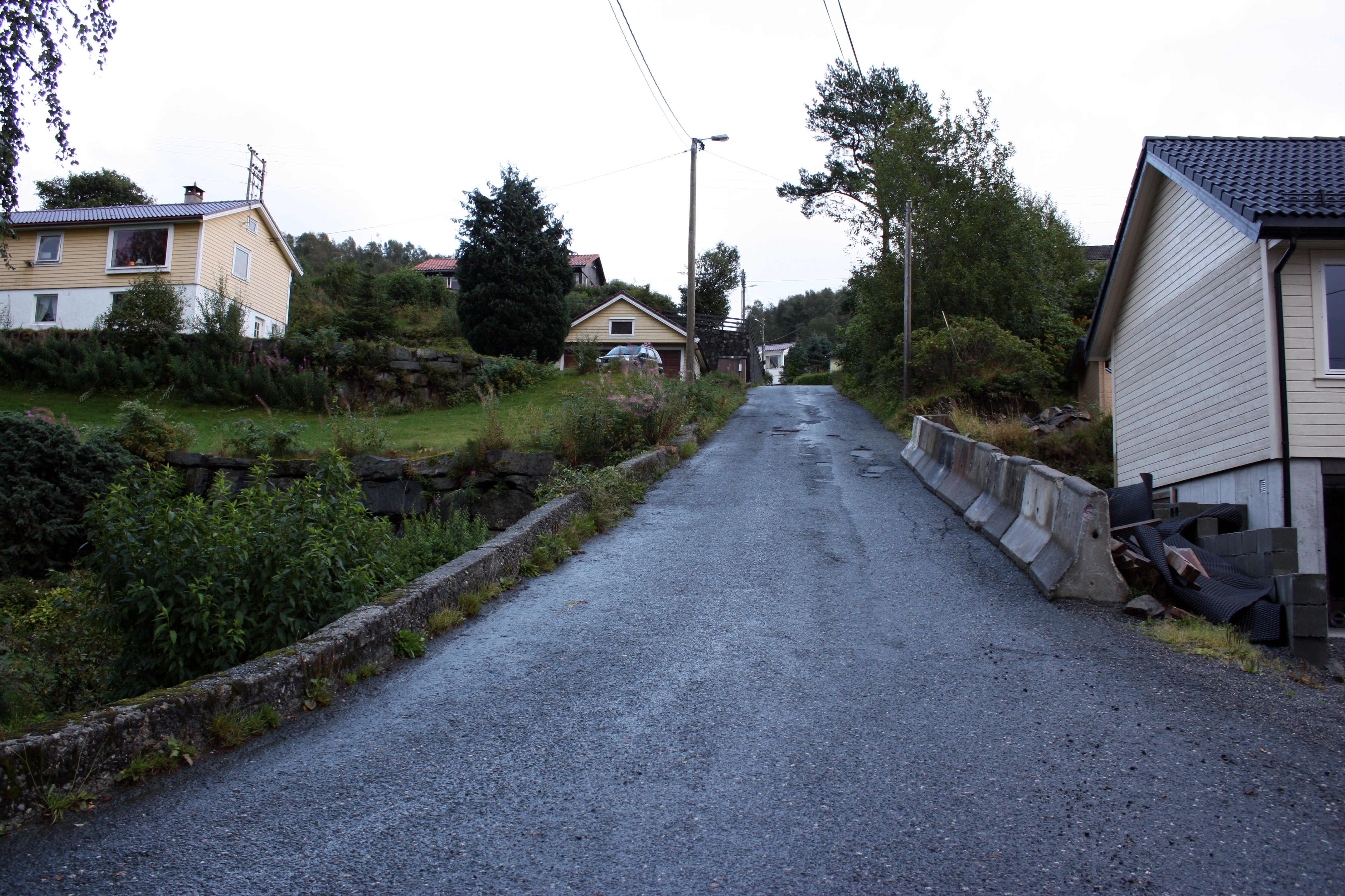 Steintræbakken, Fana, Bergen.